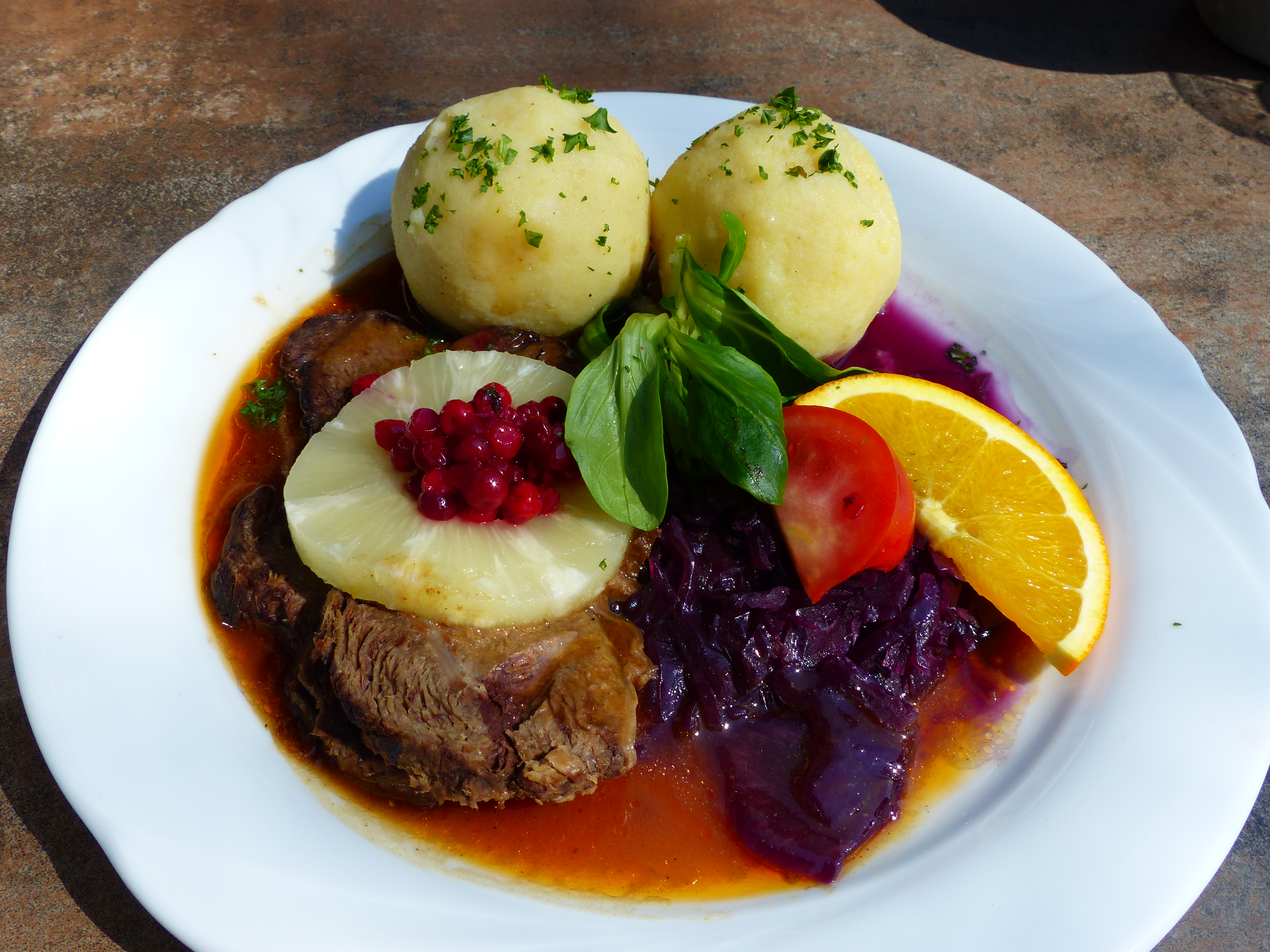 Hirschkeule mit Rotkohl, Ananas, Preiselbeeren und Kartoffelklößen, Gaststätte Erntekranzbaude, Oppach, Oberlausitz